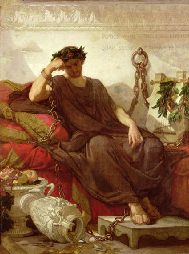 Dipinto di Thomas Couture (1866), olio su tela. Conservato presso il Musee des Beaux-Arts, in Francia.